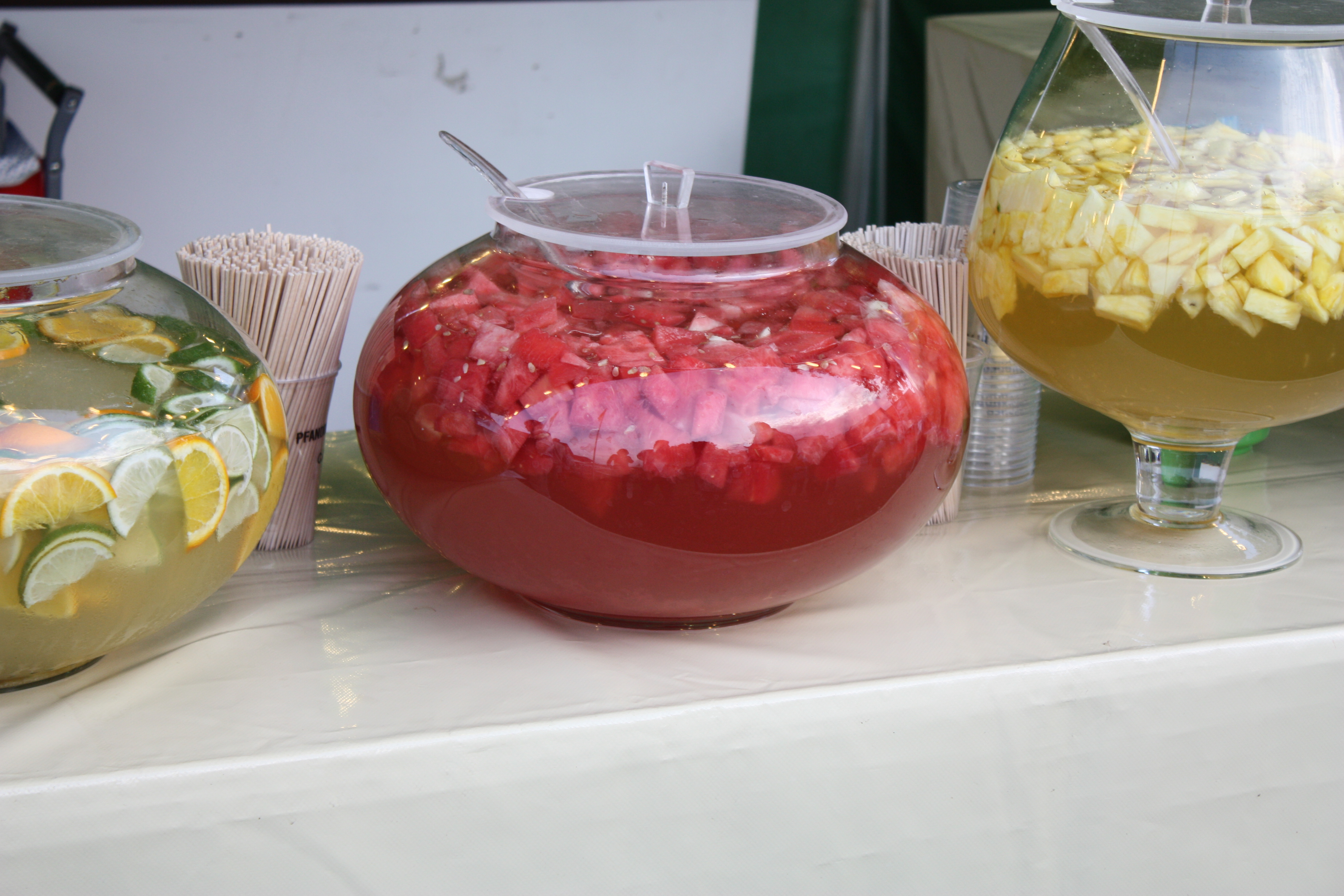 Früchtebowle, Steinhude